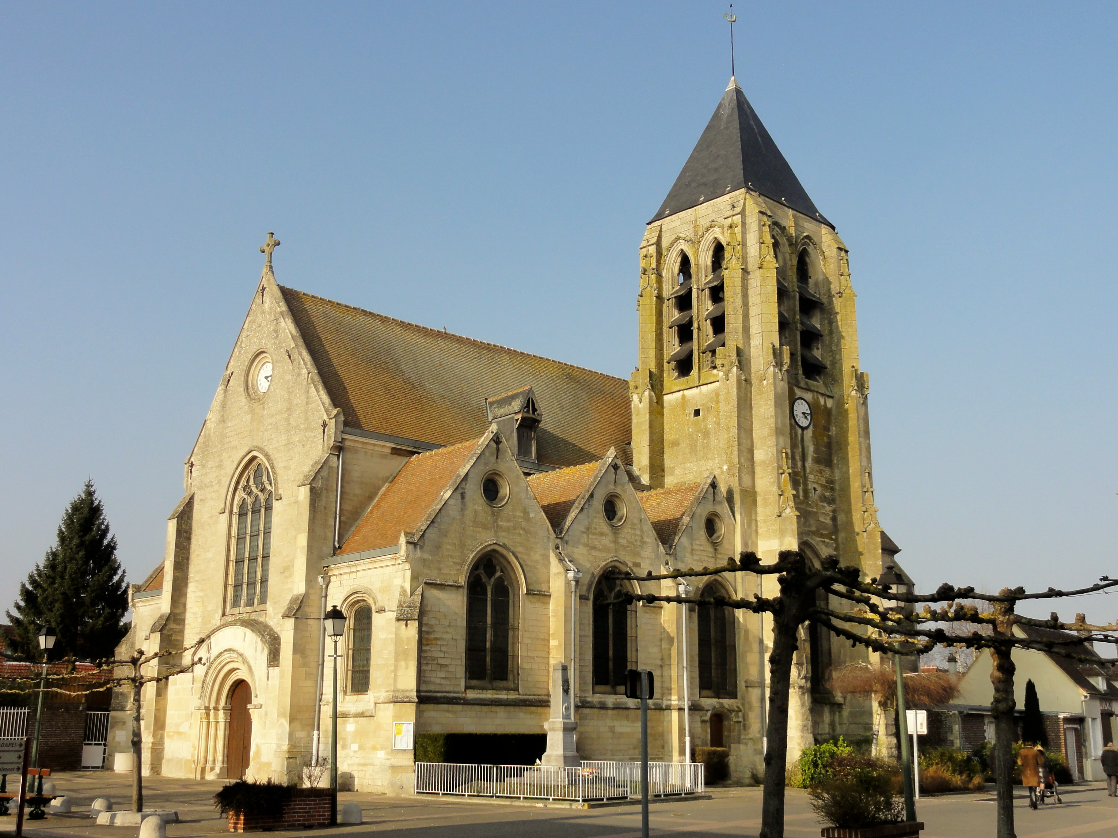 Vue depuis le sud-ouest.